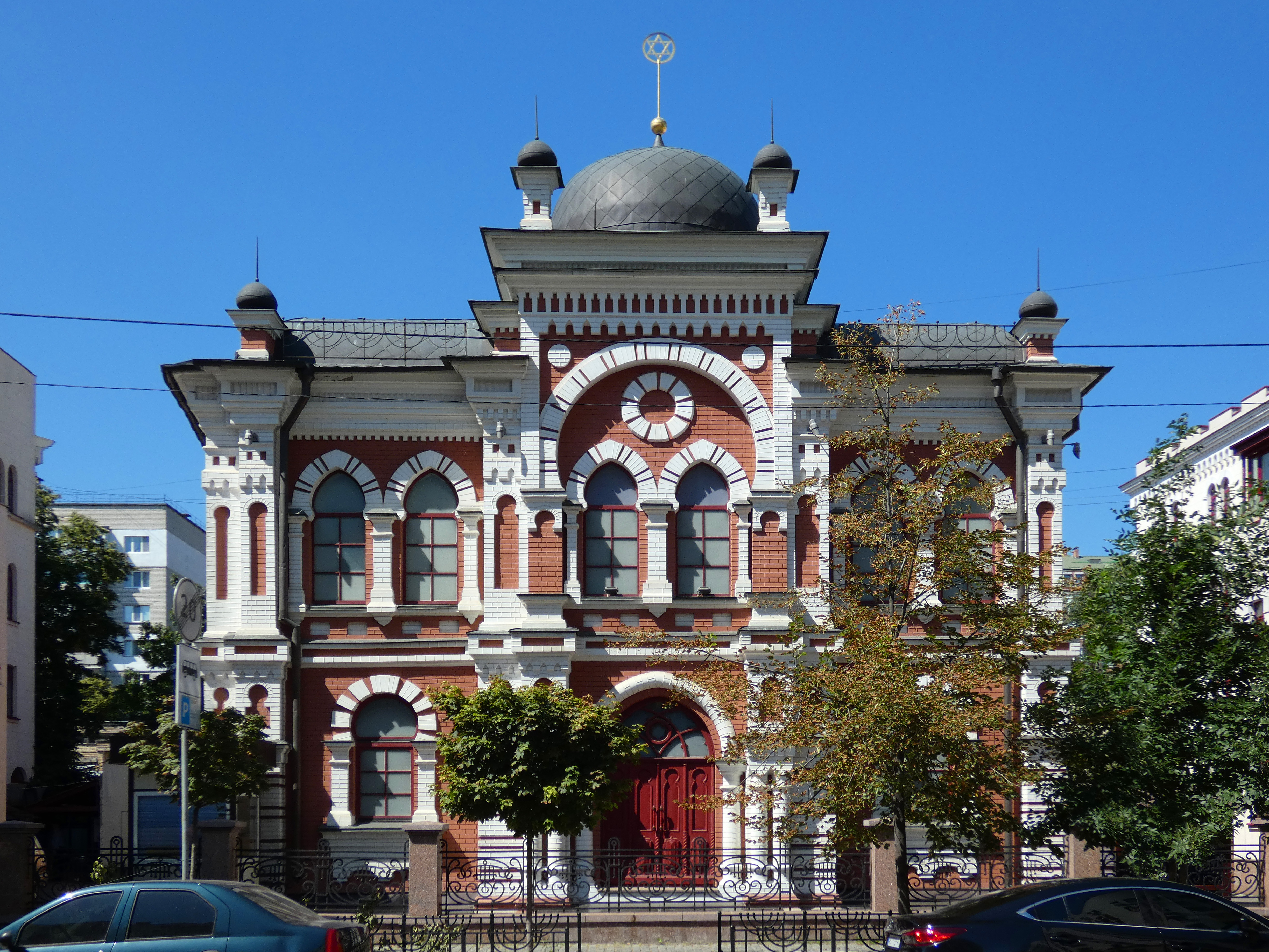 Будівля Київської іудейської громади, Київ, Щекавицька вул., 29